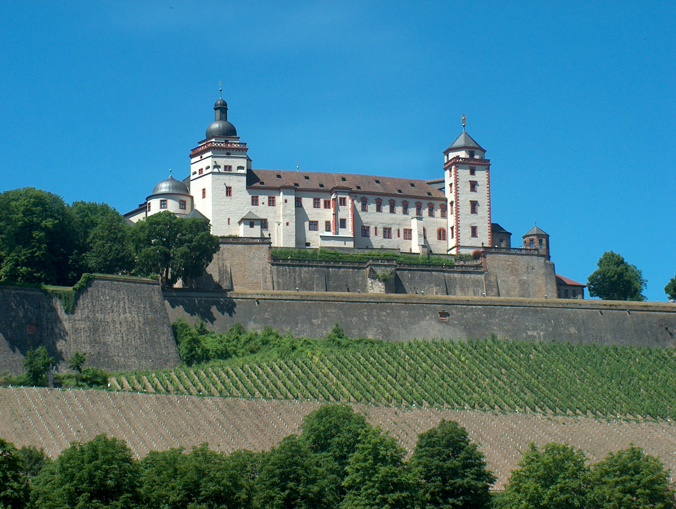 Die Festung Marienberg in Würzburg vom Mainkai aus gesehen. The Marienberg Castle in Würzburg as seen from the River Main.